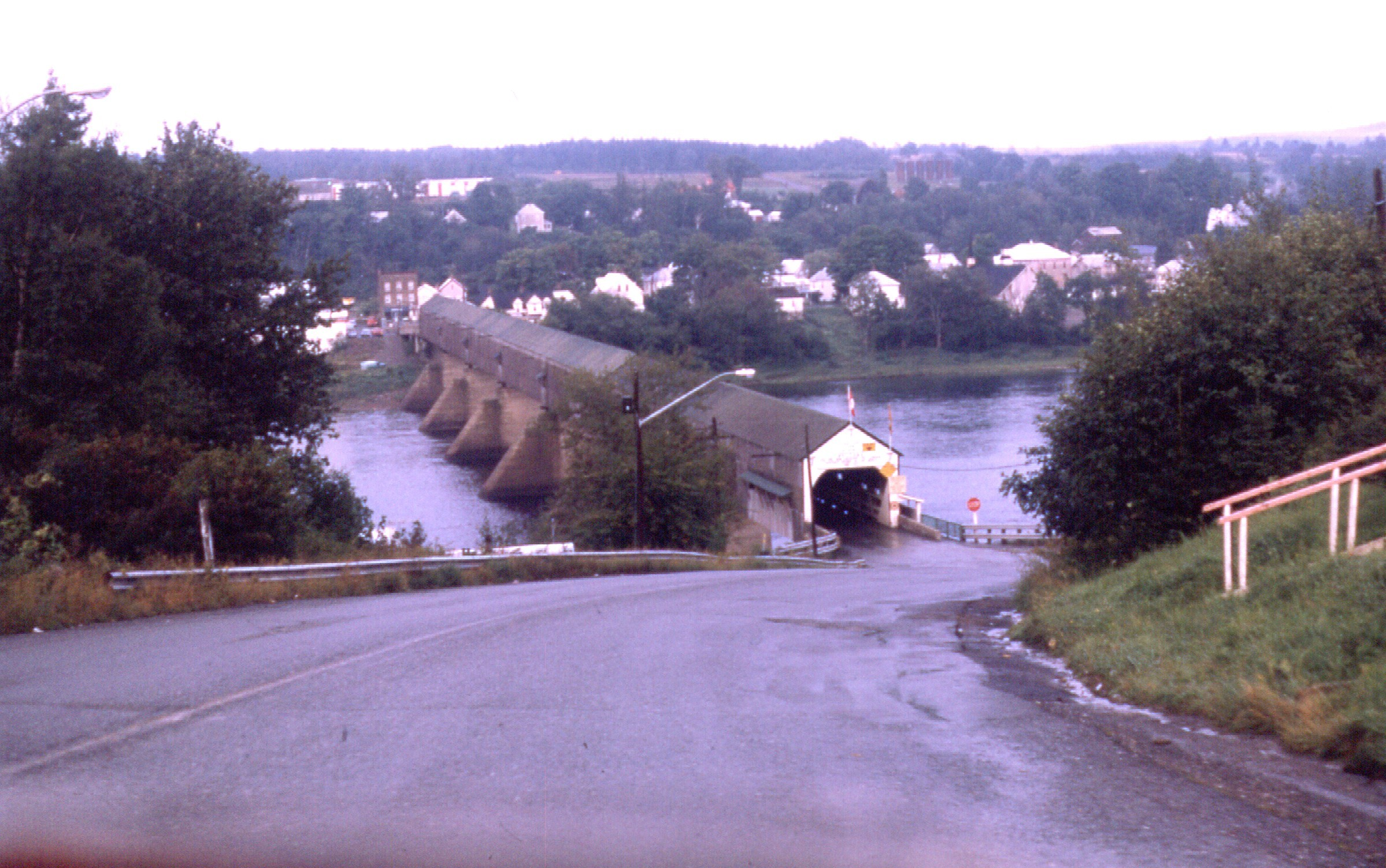 Pont de Hartland en août 1973